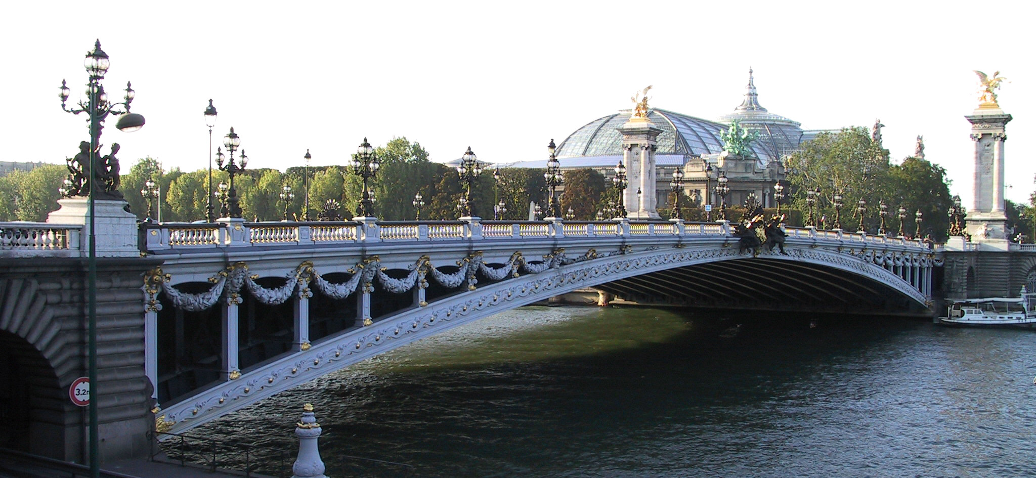 Pont Alexandre III, Paris, Septembre 2004